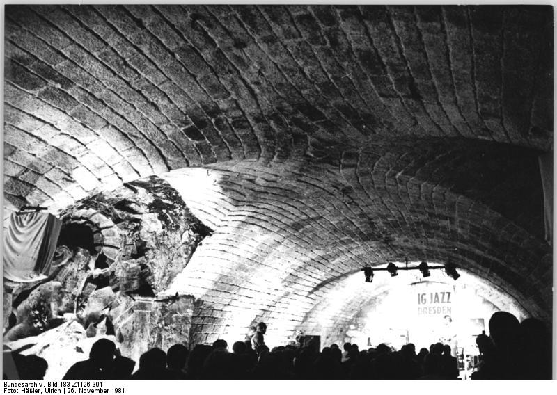 Dresden, Kurländer Palais, Kellergewölbe, Bühne Zum Beitrag: "Jazz im Weinkeller Augusts des Starken" - Auch "Staatsgeschäfte und ernste Dinge" nicht untersagt ADN-ZB Häßler 26.11.1981 Die Dresdner Interessengemeinschaft Jazz im Kulturbund der DDR schuf sich in den Kellergewölben des am 13. Februar 1945 zerstörten Kurländer Palais, das für den Wiederaufbau vorgesehen ist, eine feste Bleibe. Der Klub mit dem beziehungsvollen Namen "Die Tonne"" faßt bei öffentlichen Konzerten und Vorträgen rund 200 Personen. (Bitten beachten Sie hierzu auch Z1126-300 u. Z1126-302!)